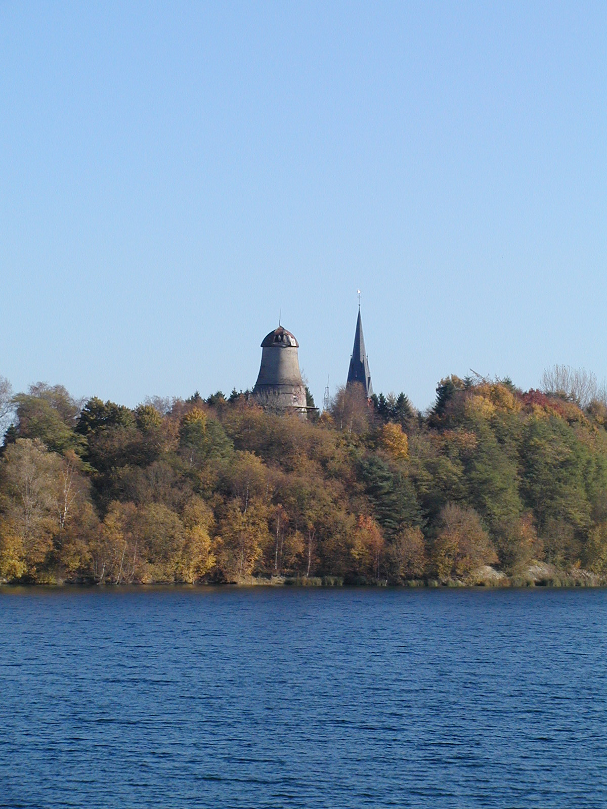 Der Kreidesee, die alte Windmühle und die Kirche